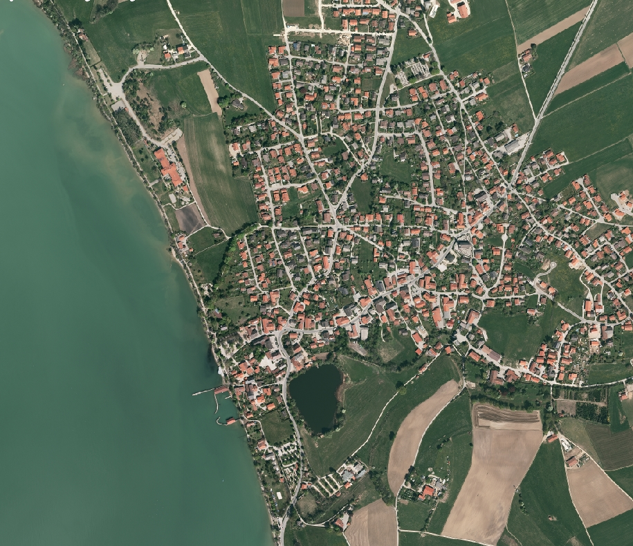 Chieming mit Pfeffersee, östlich des Chiemsees, Oberbayern